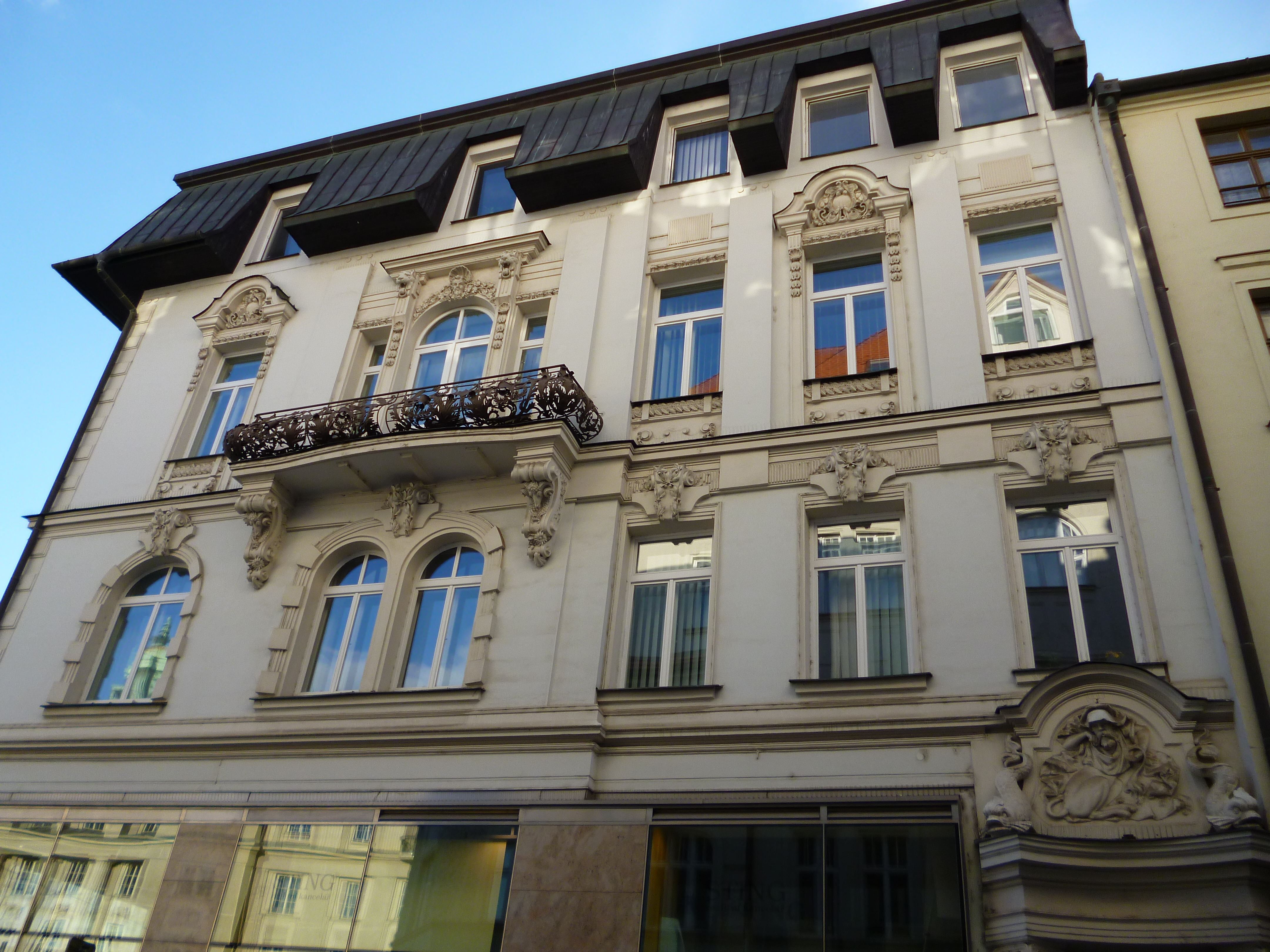 Brno - město, Zelný trh 325/18, Brno